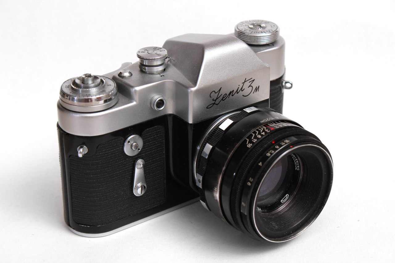 Зенит-3М с объективом Гелиос-44